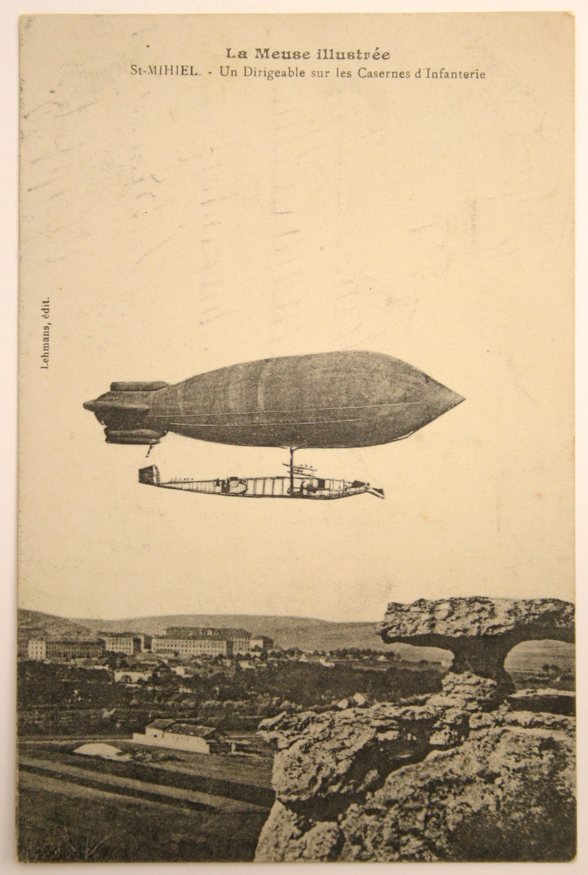 Feldpostkarte, geschrieben am 02.02.1915 aus Frankreich an Maria Söllner, Schwandorf, mit dem Bildmotiv eines französischen Luftschiffs bei St. Mihiel.